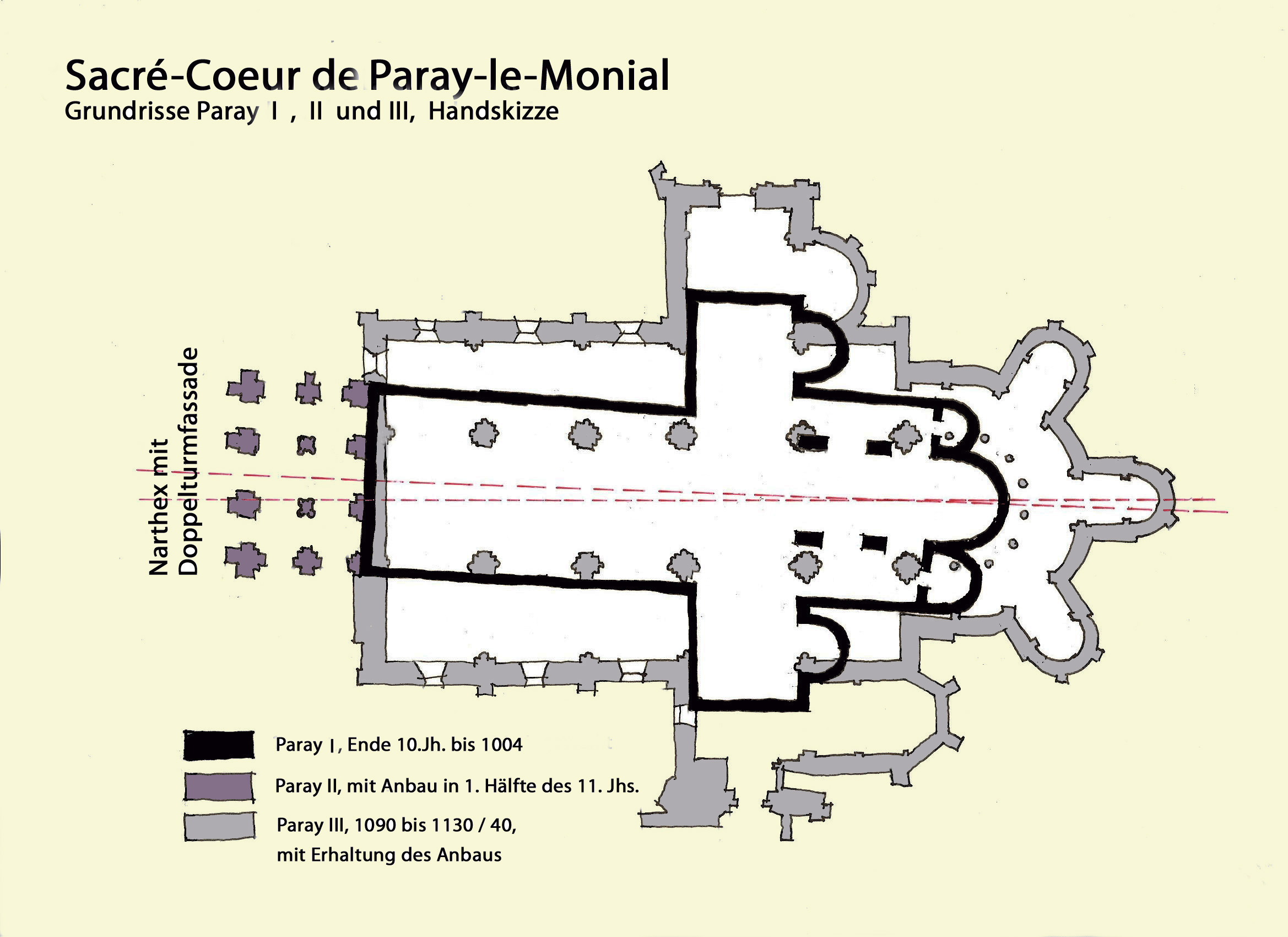 Paray-le-Monial_I,_II_u._III, Grundriss, Handskizze